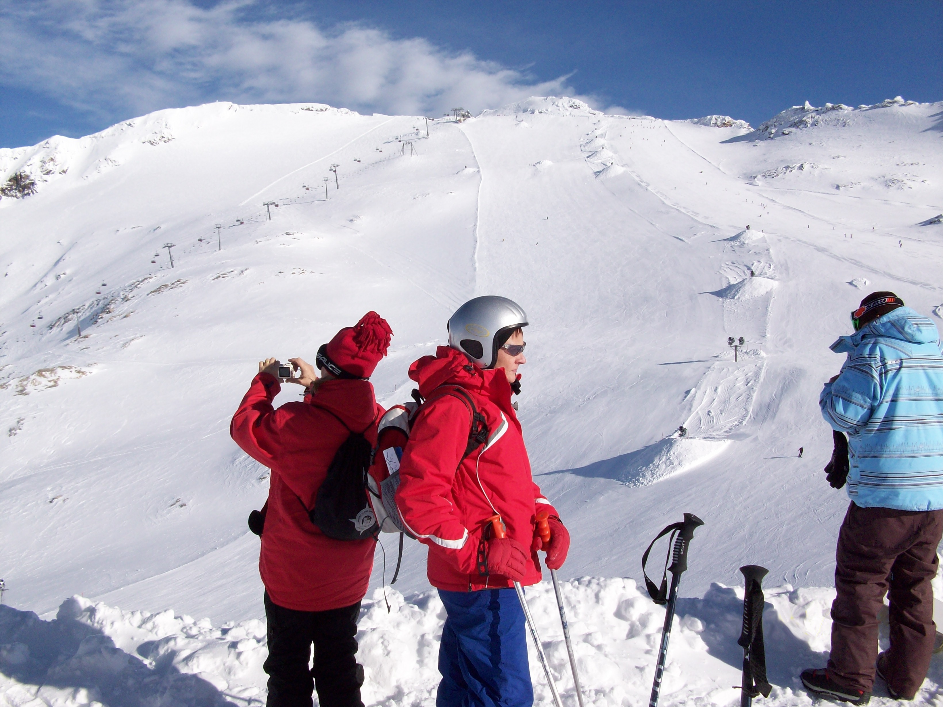 Mölltaler Gletscher, 2800m, Blick von der Mittelstation zum Schareck